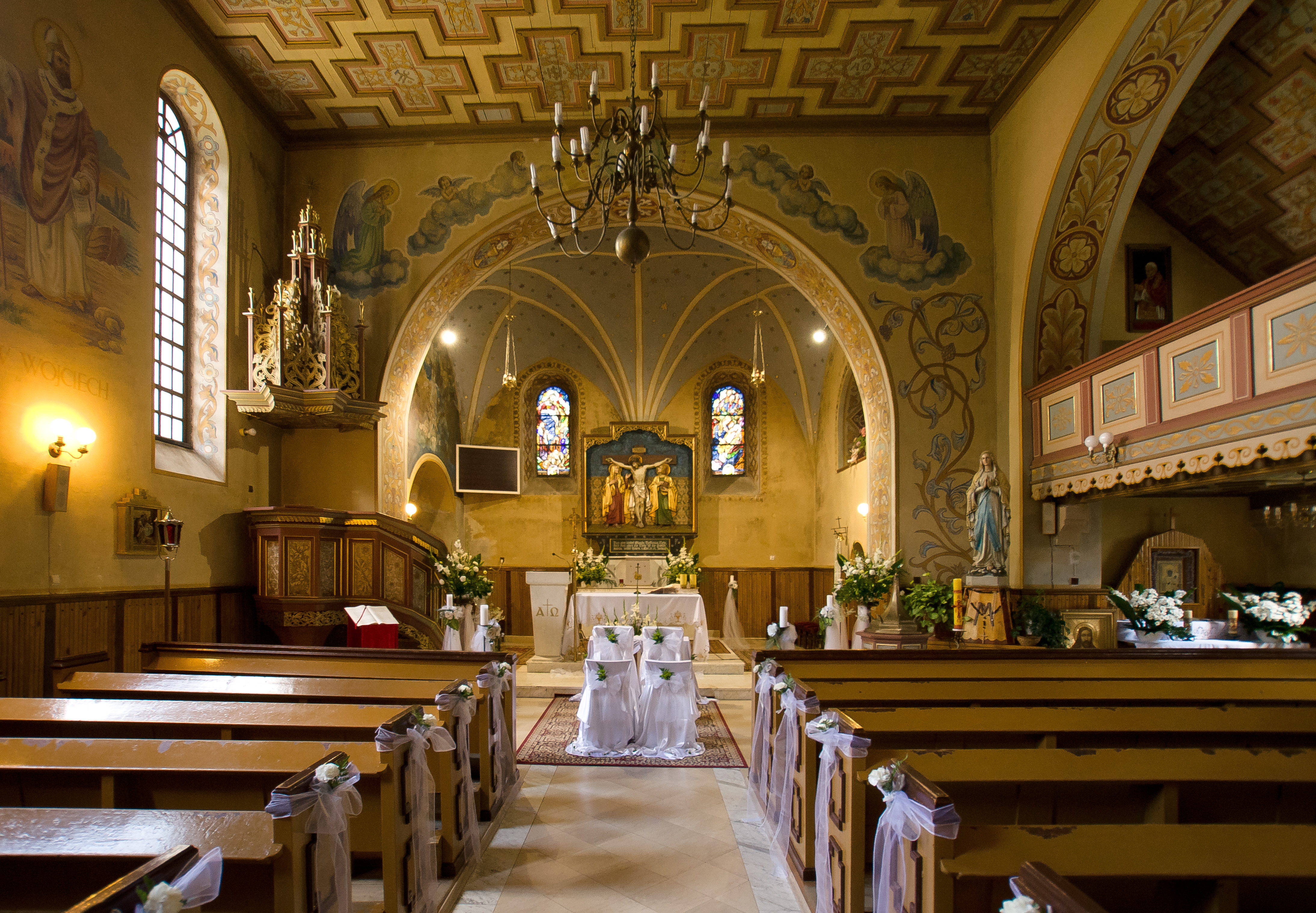 Wnętrze kościoła p.w. Wniebowzięcia NMP z roku 1924 we wsi Kalinowo (powiat ełcki) przygotowane do ceremonii ślubnej.